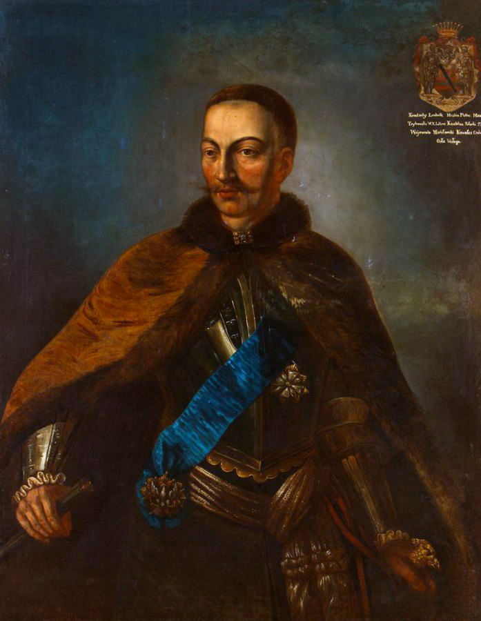 Беларуская (тарашкевіца): Партрэт Канстантына Людвіка Плятэра (Kanstantyn Ludvik Plater)